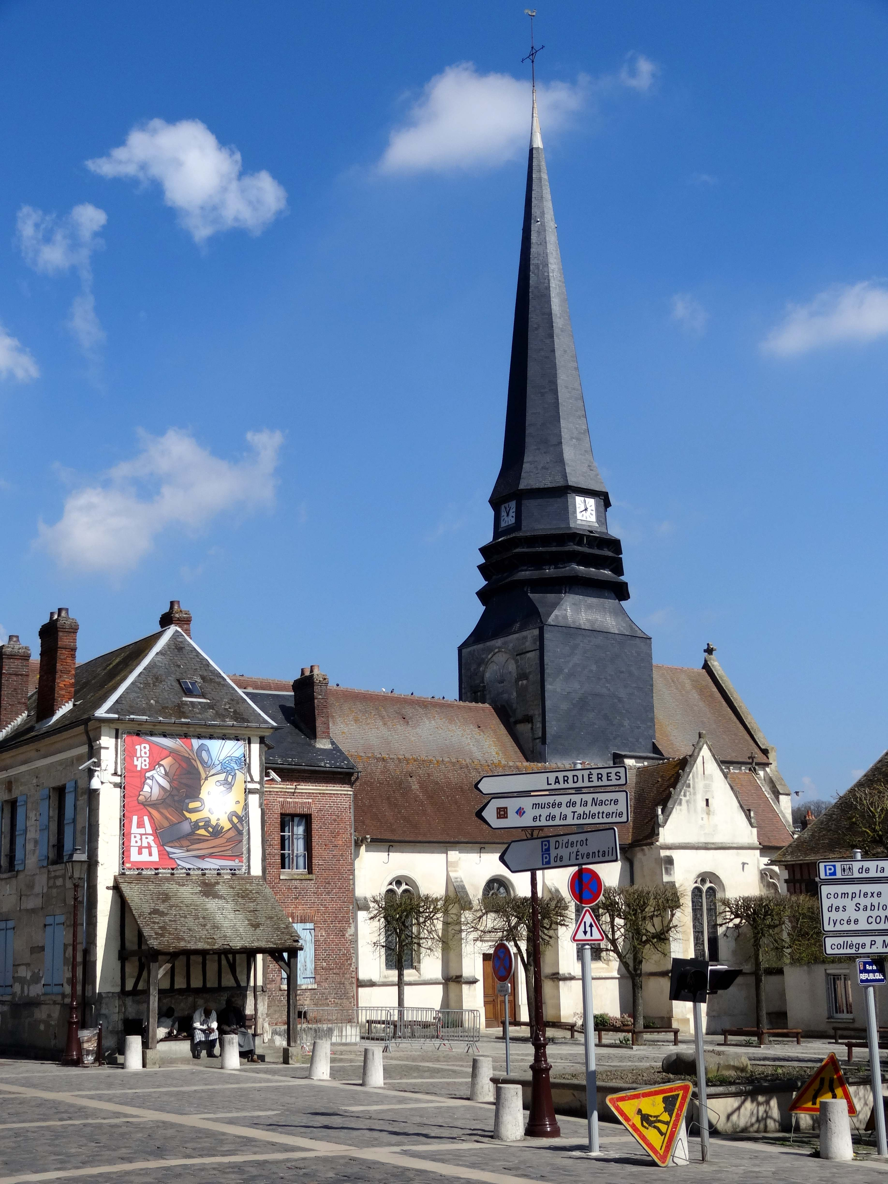 Église Saint-Lucien de Méru - voir titre.